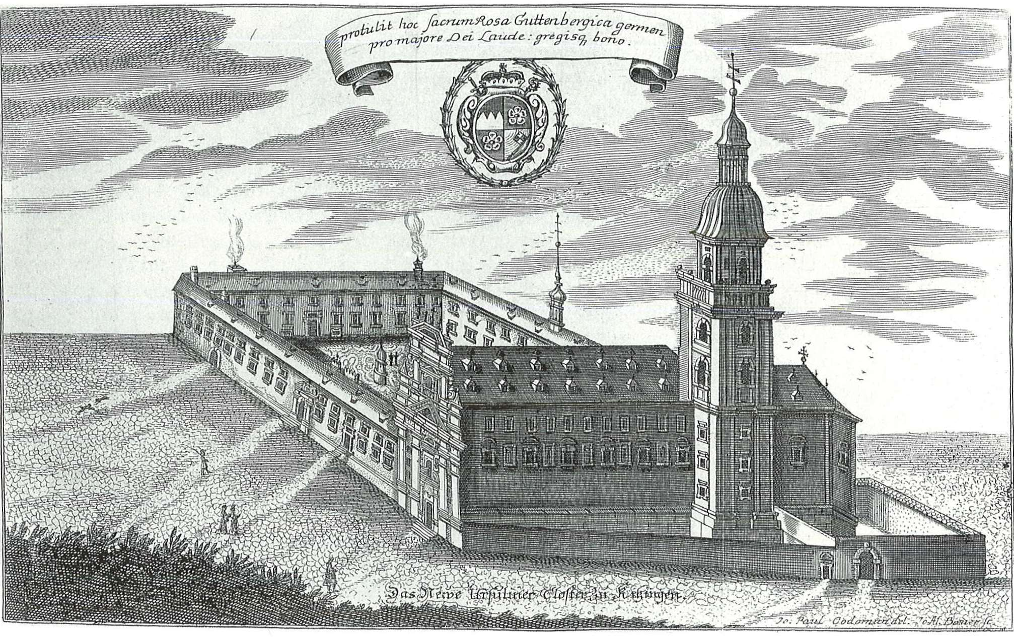 Kupferstich von Johann Paul Codoman 1692, Petrinikirche Kitzingen, Ursulinenkloster